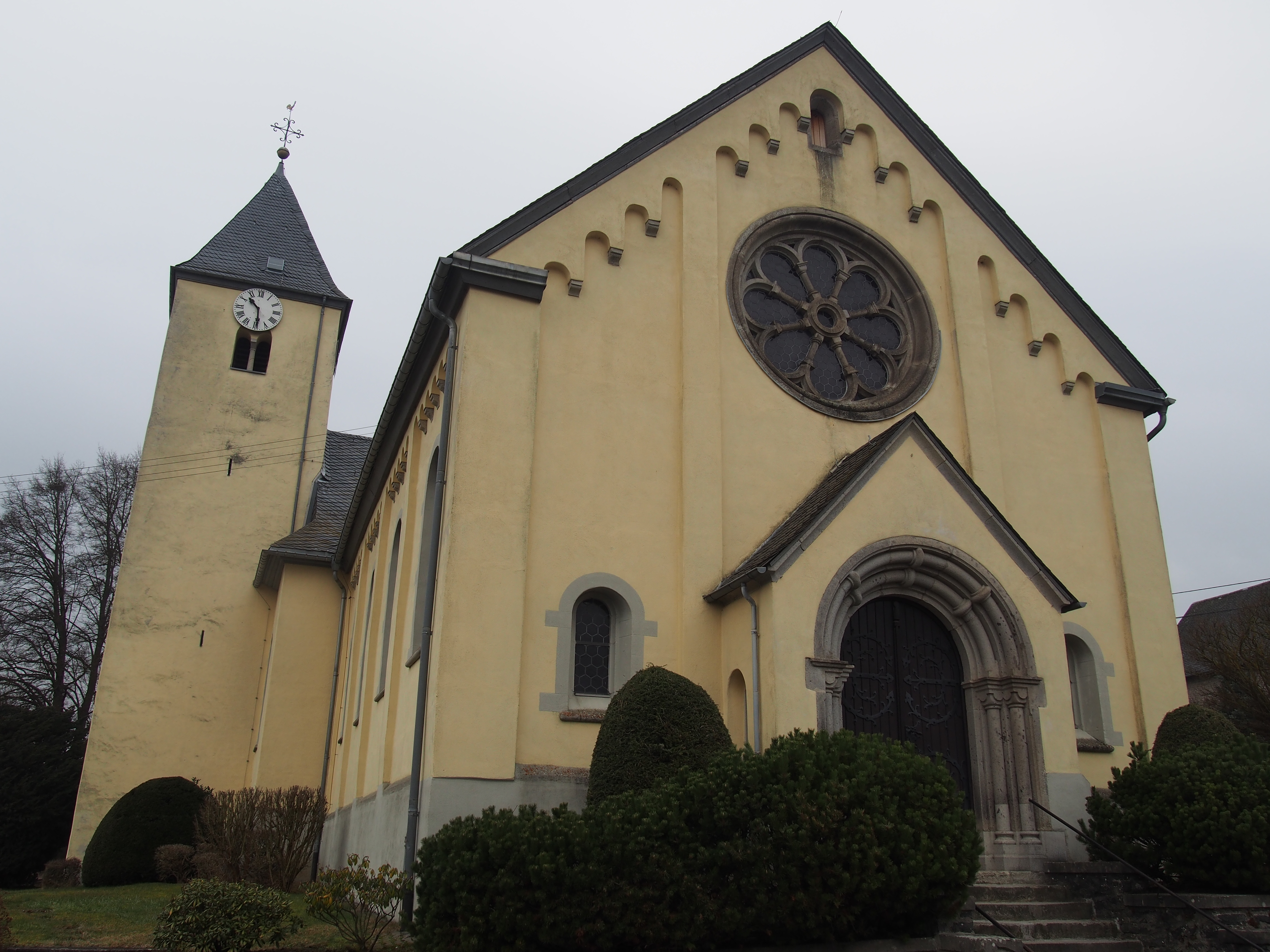 Die Kirche (zwischen 1150 und 1200 erbaut) in Berod bei Wallmerod mit romanischer Westturm ist das älteste Kultudenkmal des Dorfes.